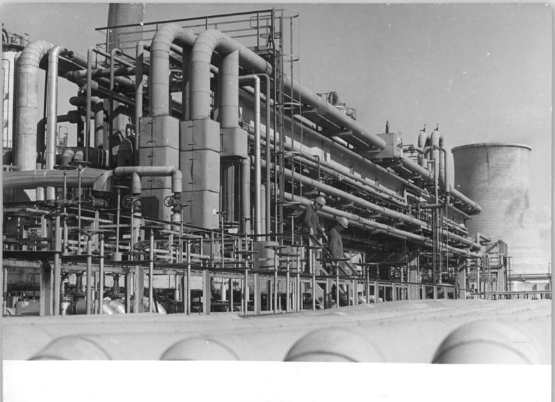 Zentralbild-Reiche-2.11.70-ku-Bez.Frankfurt-O: Im Petrolchemischen Kombinat Schwedt leistet das Kollektiv der Rohöldestillation III hervorragendes. Durch verbesserte Arbeitsorganisation und Einbeziehung aller Anlagenfahrer in das Wettbewerbsgeschehen konnten bei der Generalreparatur vier Tage eingespart werden. Die Rohöldestillation ist die erste Verarbeitungsstufe und damit das Herz des Schwedter Chemiegiganten. Durch die Arbeit dieser Stufe wird entschieden, mit welchen Kosten und in welcher Menge Plaste und Benzine produziert werden können.